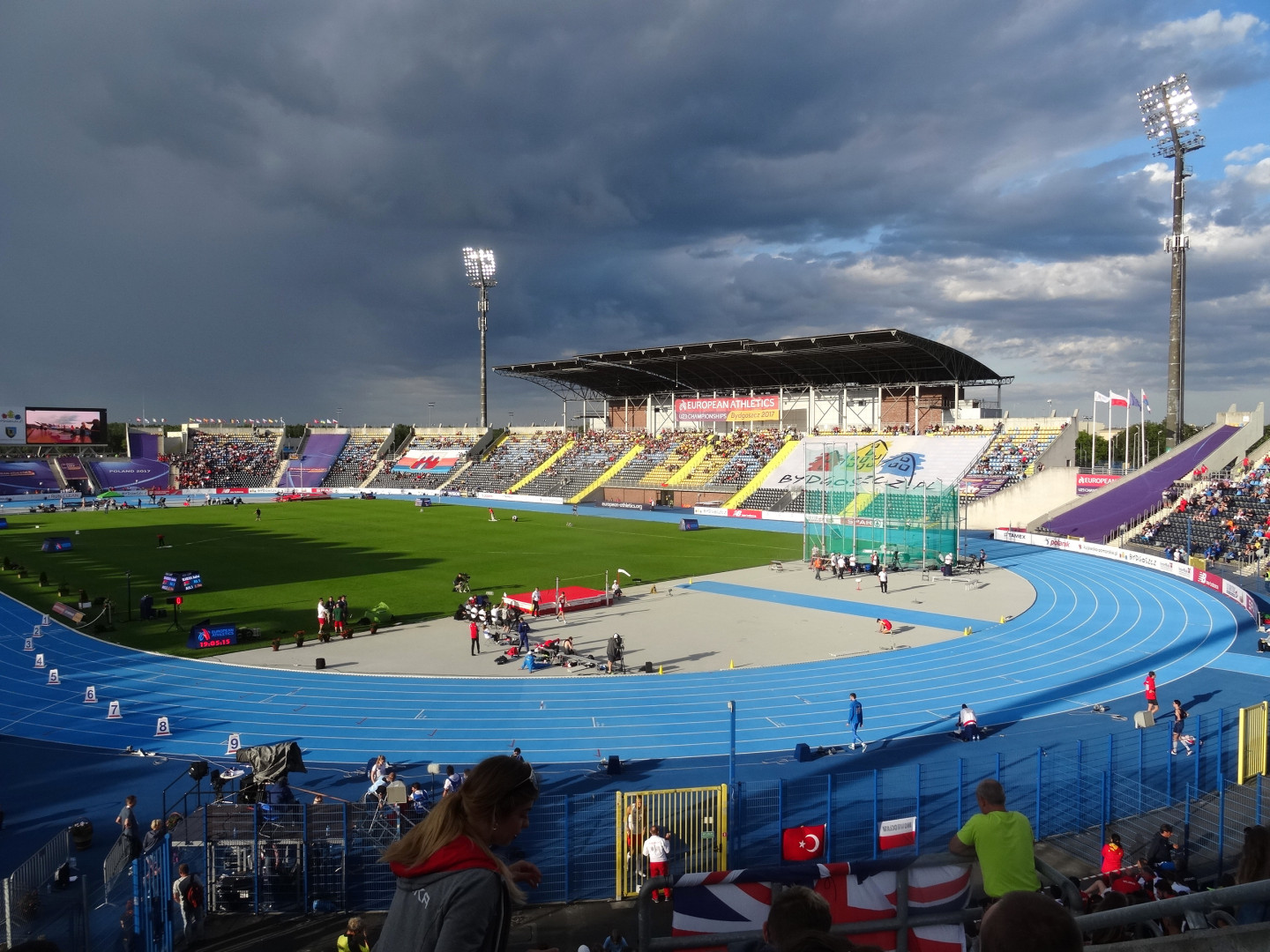 Młodzieżowe Mistrzostwa Europy w Lekkoatletyce U23 w Bydgoszczy 13-16 lipca 2017